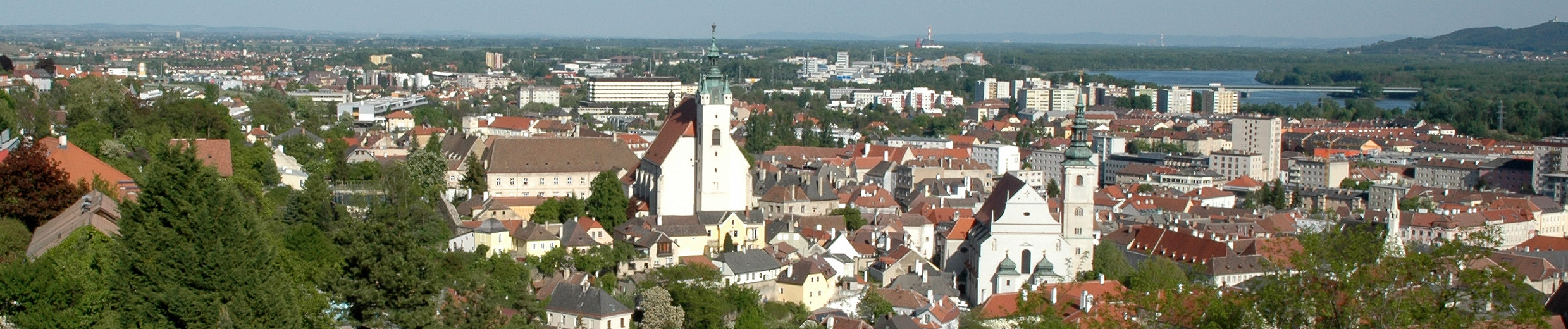 Panoramabild von Krems - von Westen gesehen